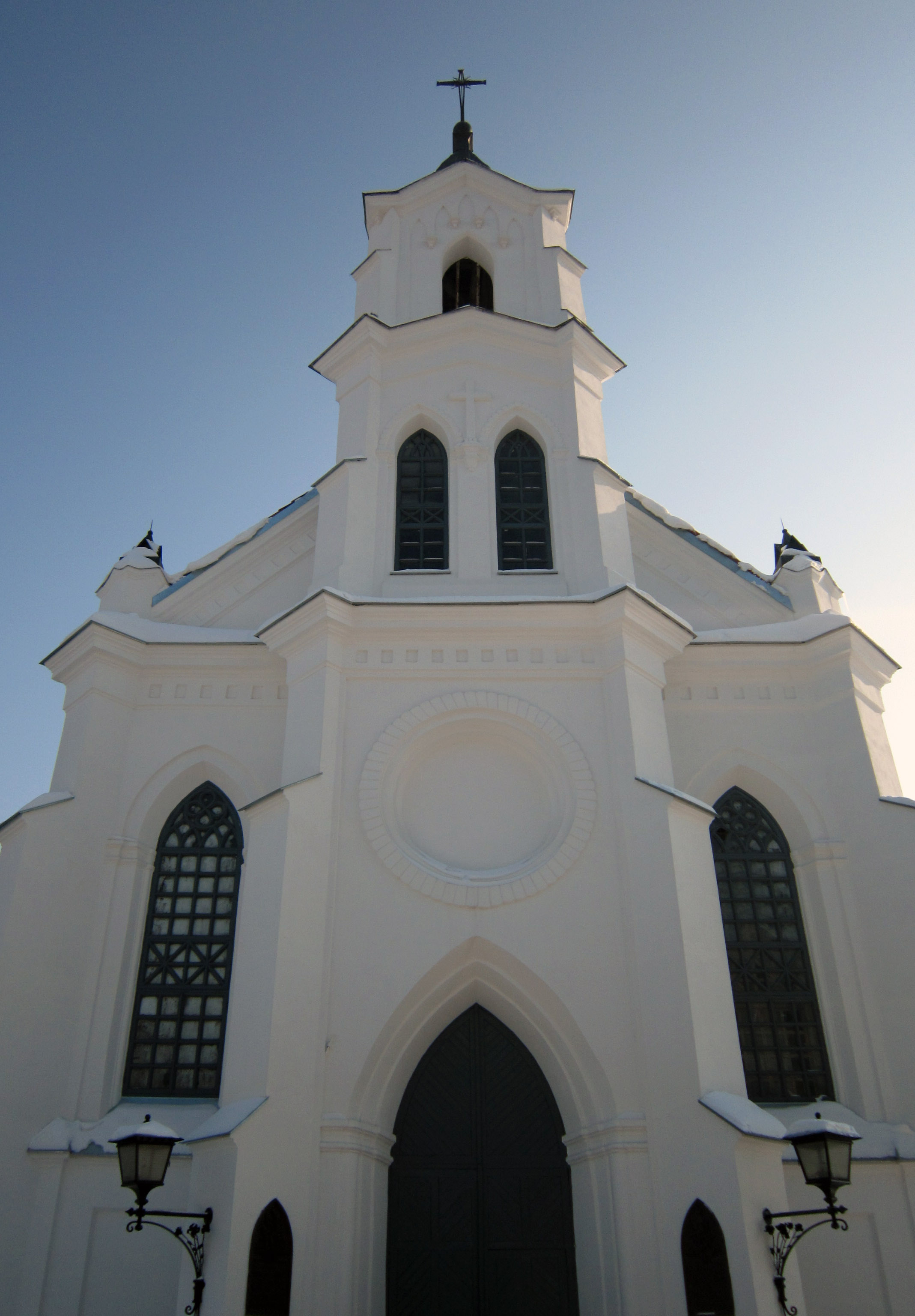 Минск. Костёл Пресвятой Троицы / Святого Роха (Золотая Горка)